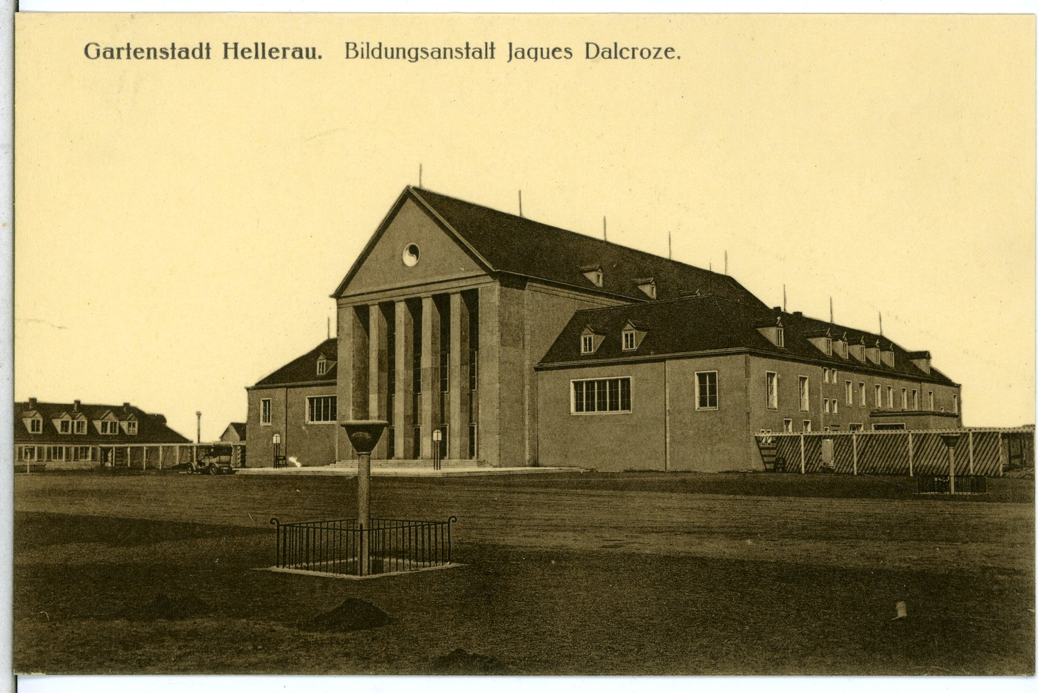 Hellerau; Dalcroze - Schule This postcard is from publisher Brück & Sohn in Meißen ( postcard has a unique number 14535 and is available in a higher resolution at the publisher. This images was uploaded in a cooperation project between Wikipedians and the publisher.